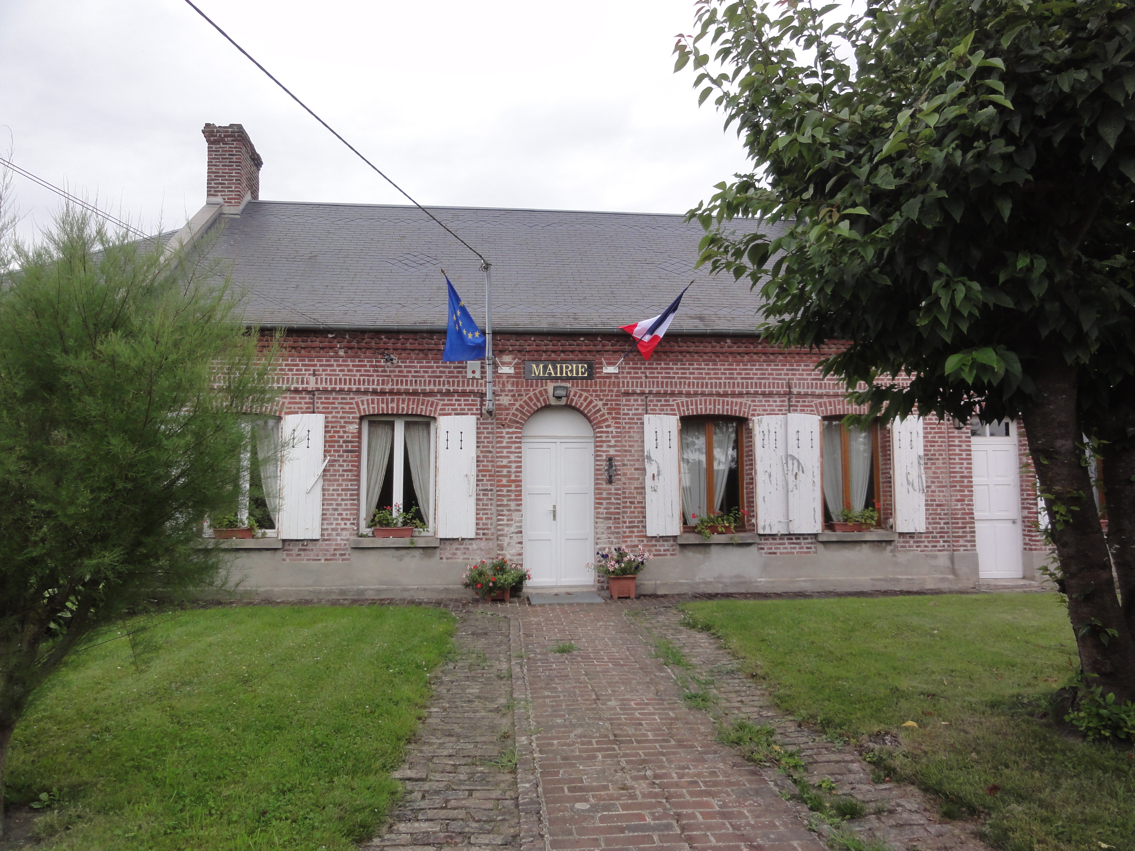 Villeselve (Oise) mairie